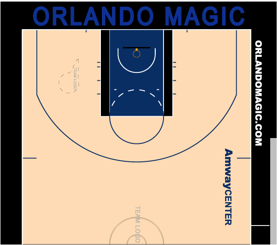 マジックホームコート配色